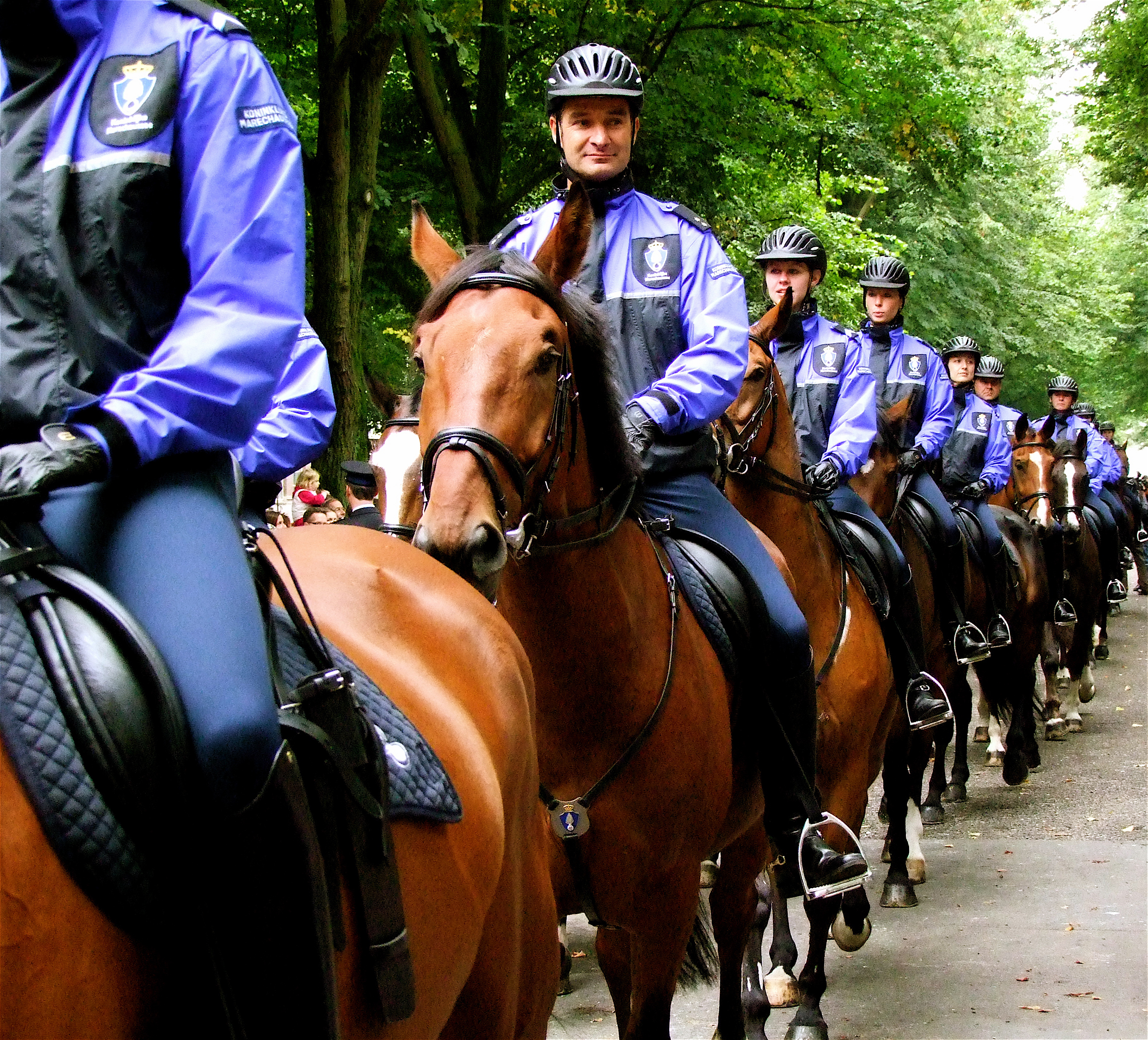 Voor het eerst in de geschiedenis oefent het Bereden Ere-Escorte van de Koninklijke Marechaussee op het Lange Voorhout In Den Haag. Dit ter voorbereiding op Prinsjesdag. De oefening vond plaats op zaterdag 13 september van 14.00 tot 15.00 uur.